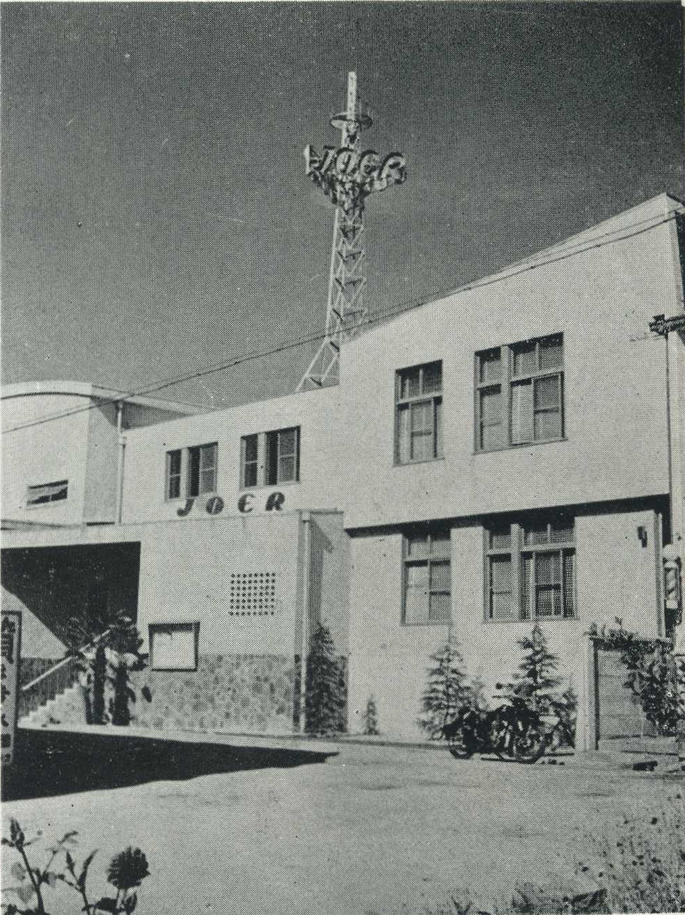 1950年代のラジオ中国、現在の中国放送。